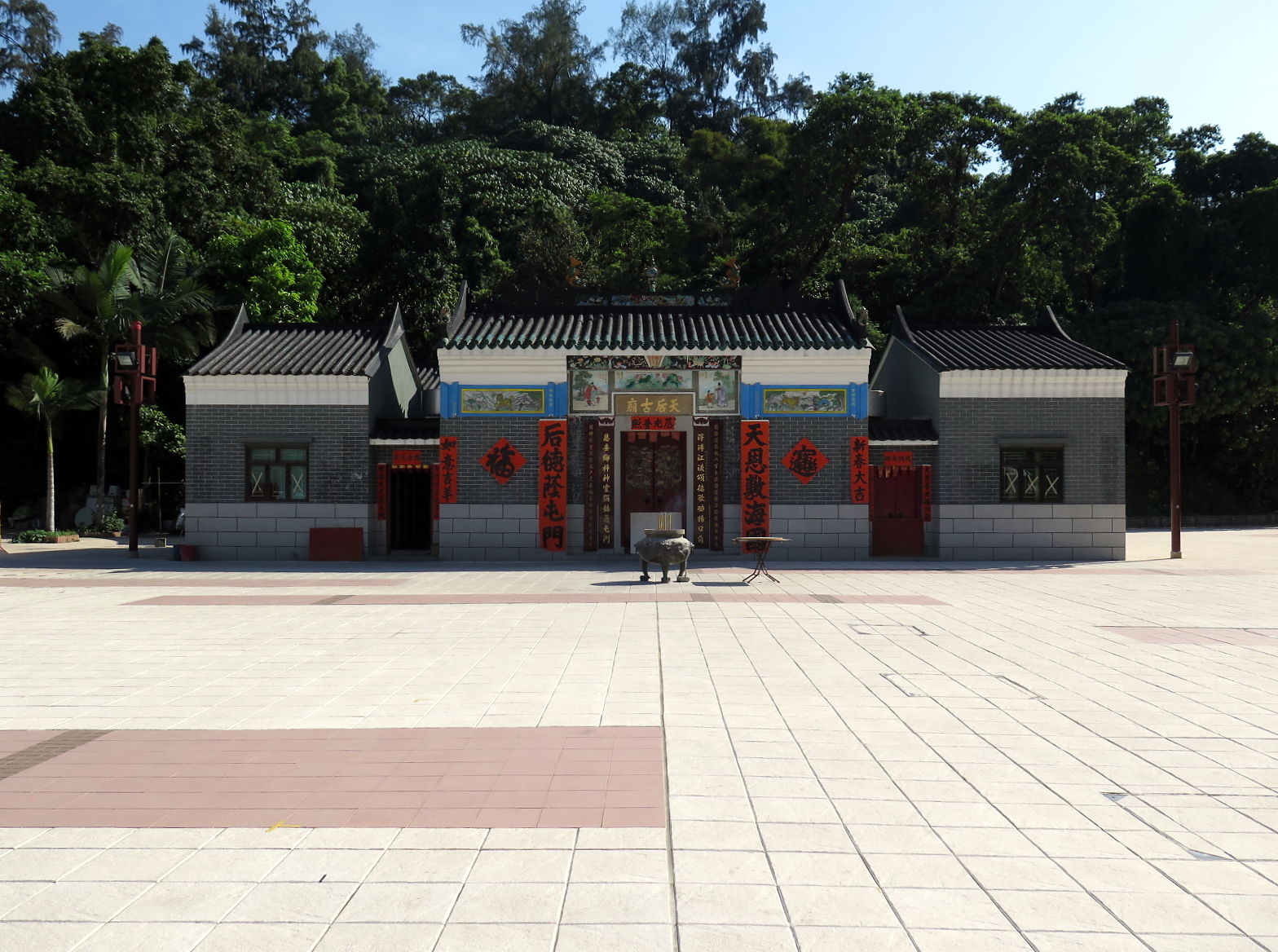 Tuen Mun Hau Kok Tin Hau Temple